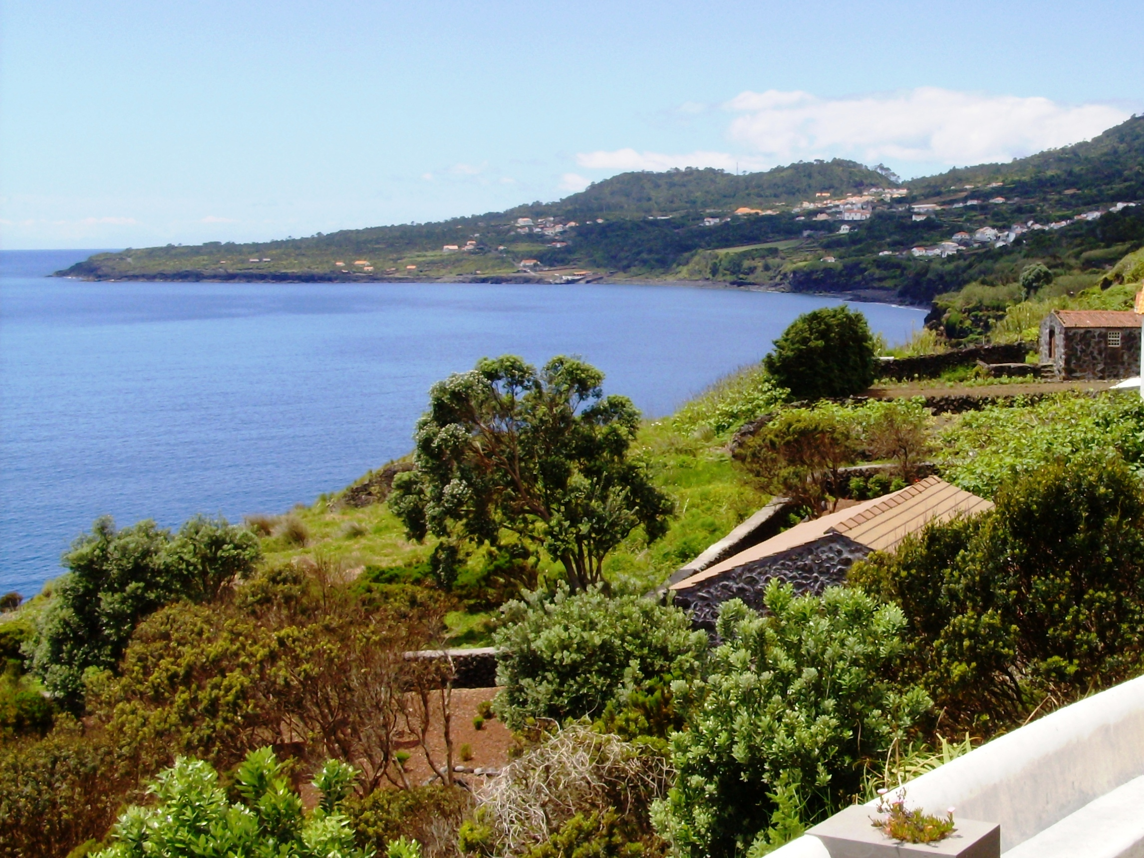 Miradouro de Santa Margarida, freguesia de São Caetano, concelho da Madalena, ilha do Pico, Açores: vista sobre a chamada "Terra do Pão".